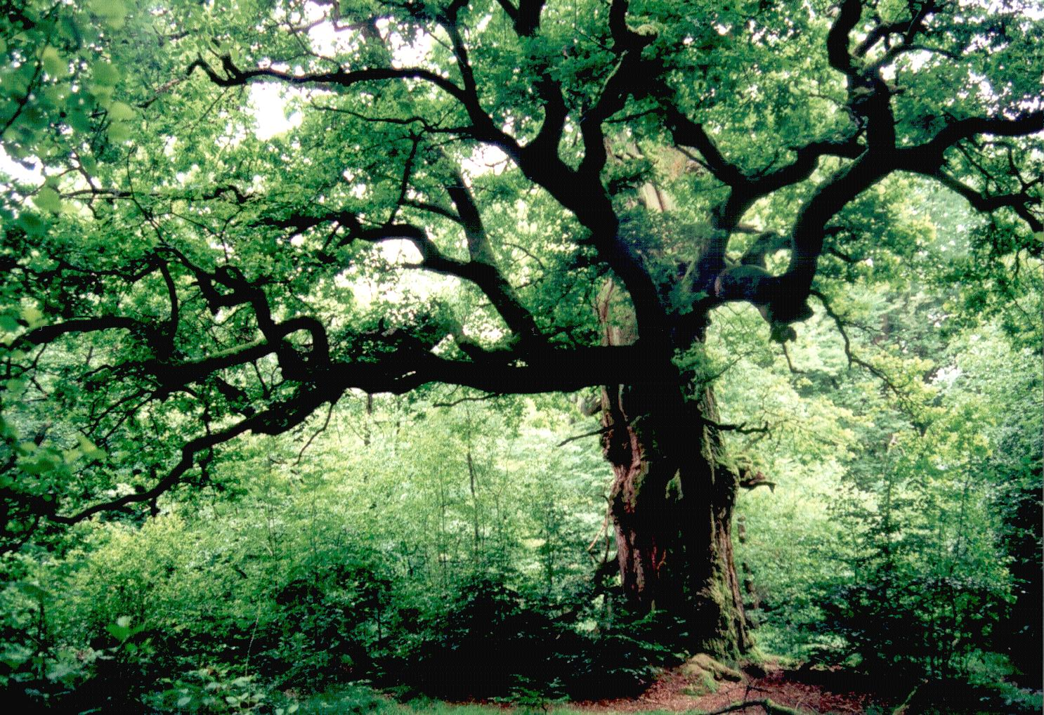 Alte Eiche mit weit ausladenden Ästen im Naturschutzgebiet „Urwald Sababurg“ bei Kassel